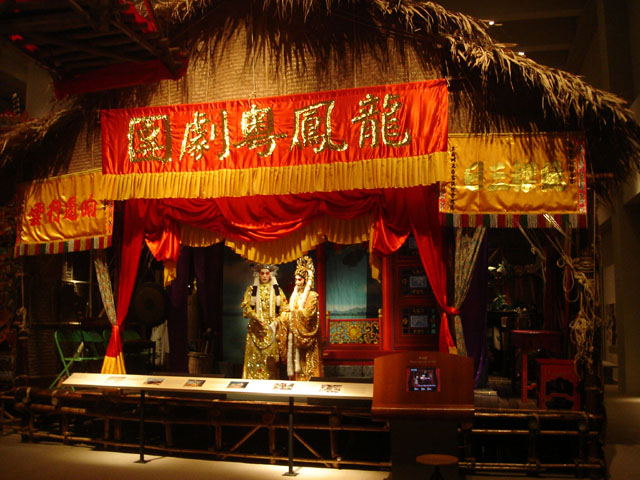 香港历史博物馆内的粤剧场景